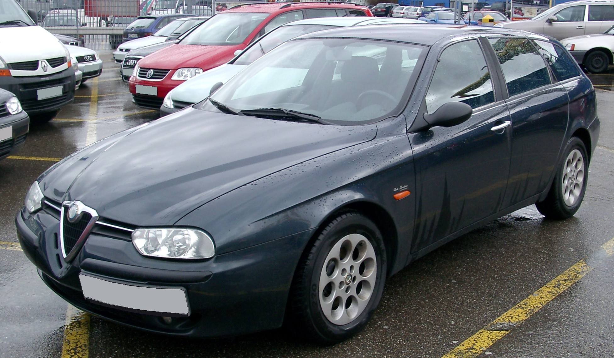 Alfa 156 Sportwagon